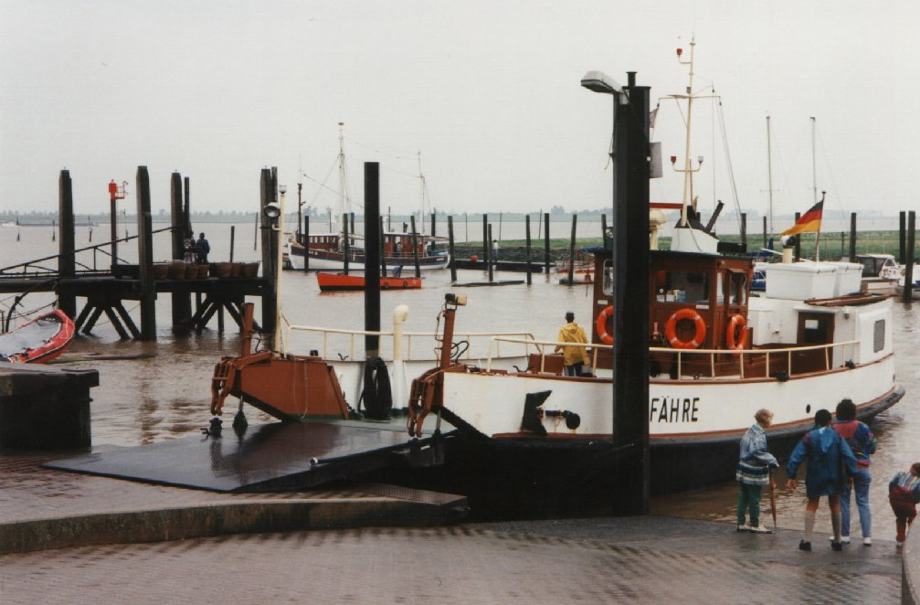 Muhdehafen von Ditzum/Ostfriesland